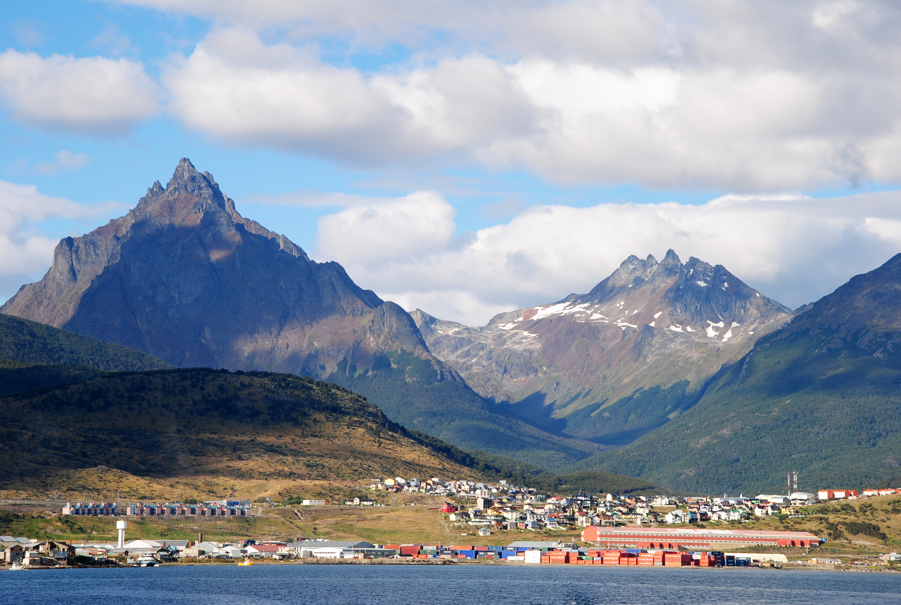 Ushuaia, Terra do Fogo